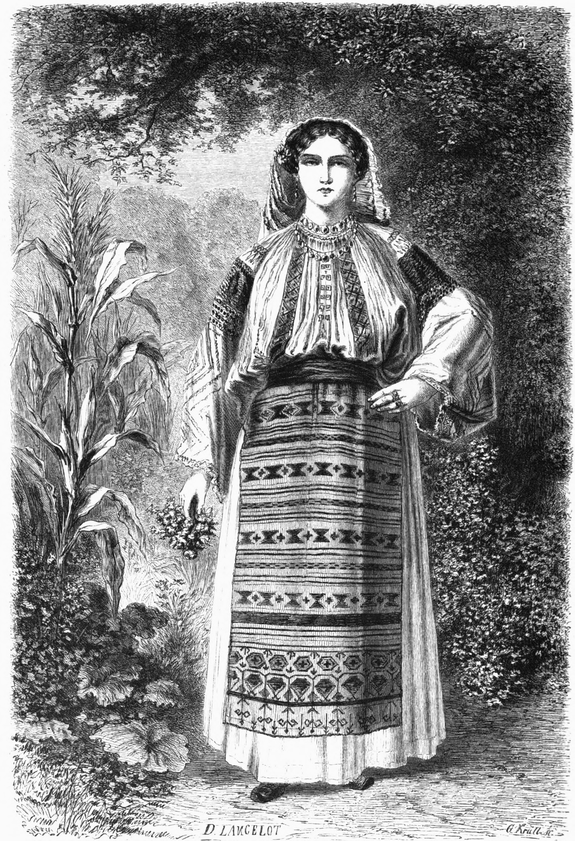 Jeune femme valaque